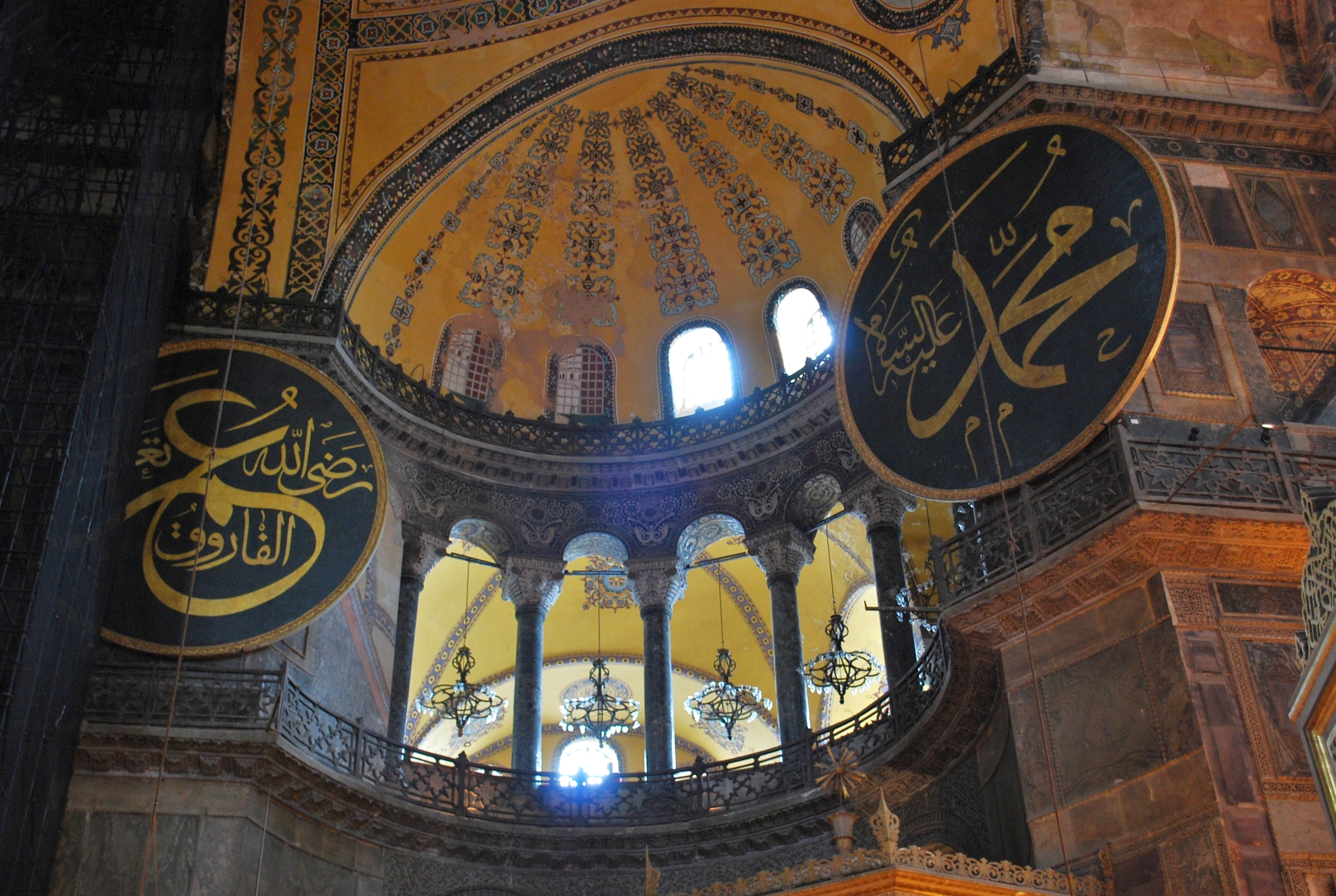 Исламские элементы